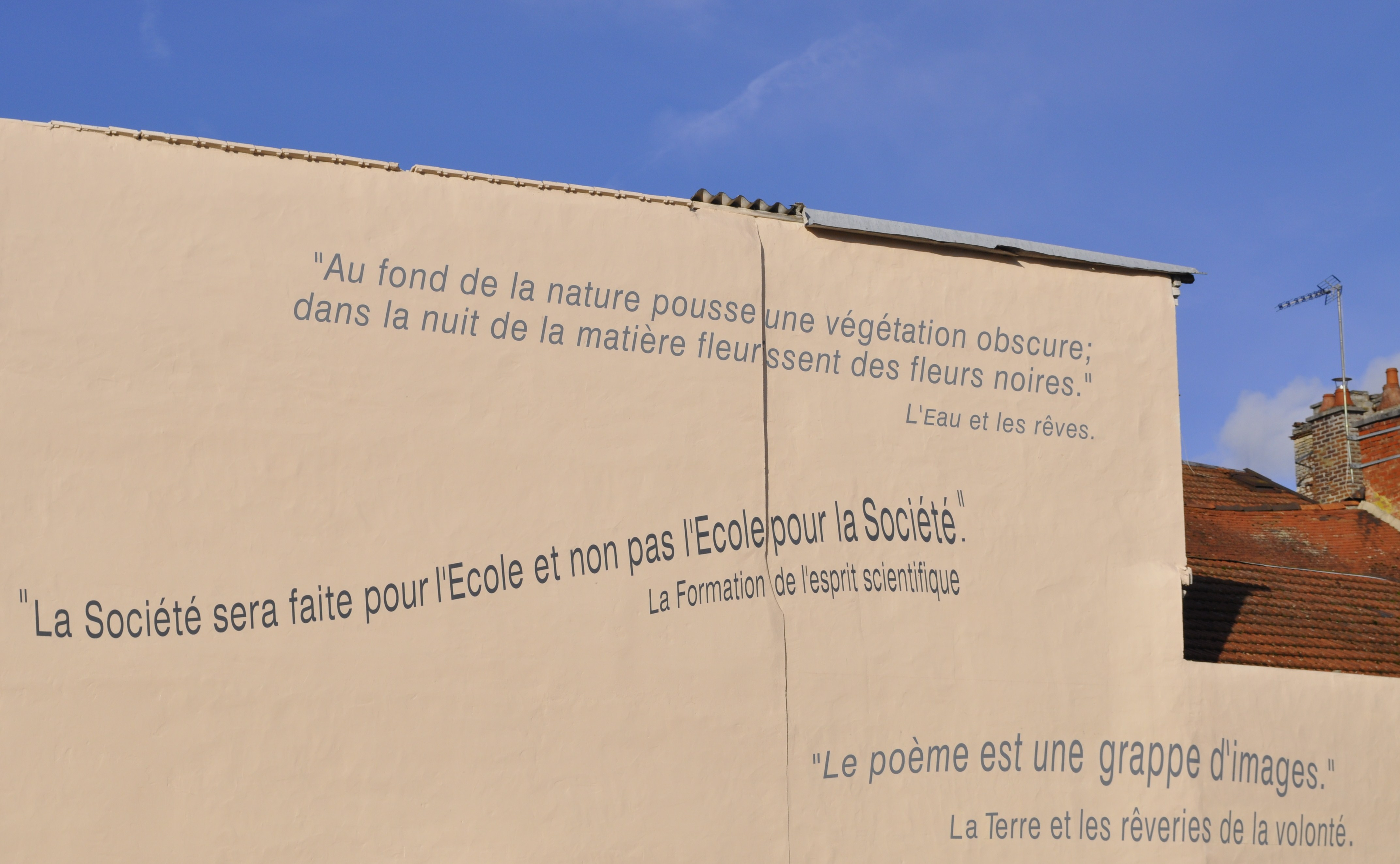 Façade peinte en hommage à Gaston Bachelard.